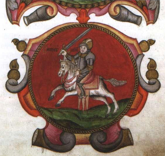 Беларуская (тарашкевіца): Герб Віцебскага княства (Viciebsk) з Пагоняй (Pahonia). Маскоўскі Тытулярнік, 1672